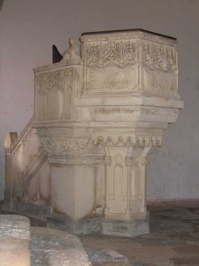 La chaire de l'église abbatiale de Saint Sauveur le Vicomte